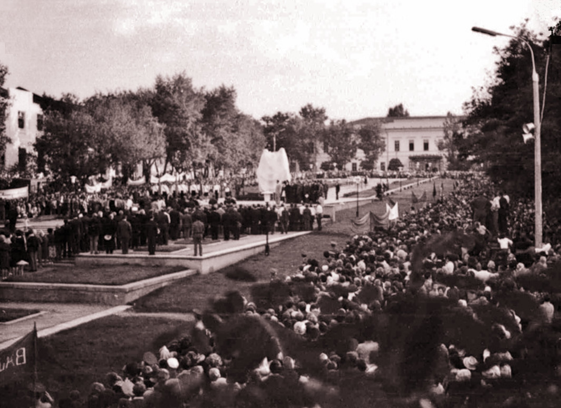 Открытие Памятника таганрогским подпольщикам «Клятва юности», Таганрог, 1973